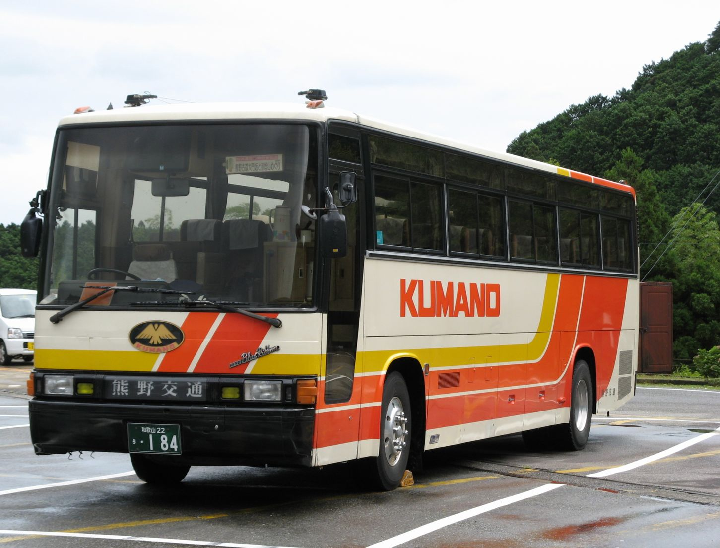 熊野交通 定期観光バス「熊野古道大門坂と那智山めぐり」 神社お寺前駐車場（那智山）にて